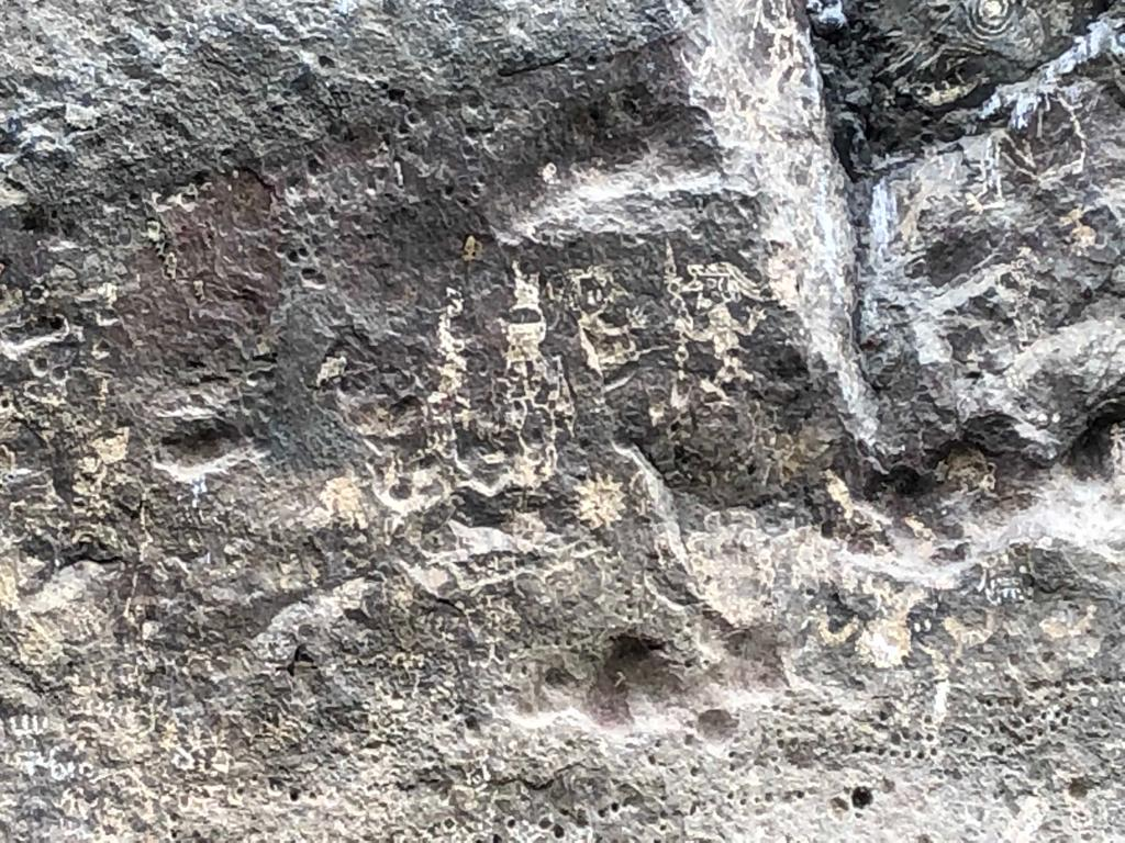 Texcal, del náhuatl tetl, piedra y xcalli, cocido. Se trata de una serie de grabados que representan rituales para provocar la lluvia y algunos animales de la zona. Es una técnica que data de la época prehispánica.